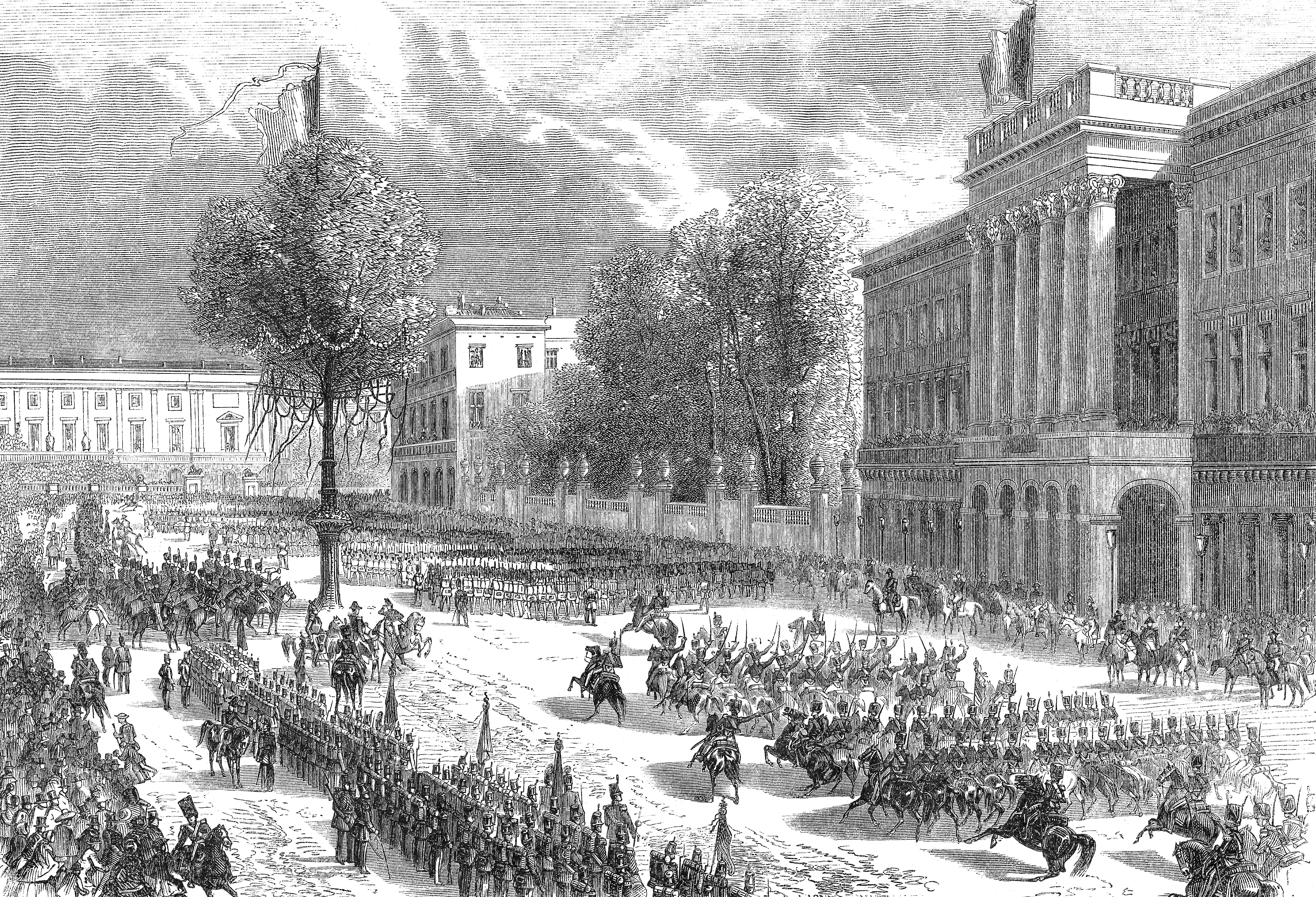 25e anniversaire de l’inauguration du roi Léopold Ier de Belgique, Palais royal (Bruxelles), le 22 juillet 1856. — La revue a lieux en présence du Roi, du duc de Brabant, du comte de Flandre, du duc Ernest Ier de Saxe-Cobourg-Gotha et du prince George de la Saxe royale, ainsi que d’un nombreux état-major. De nombreuses légions de la garde civique et régiments de l’armée défilent.